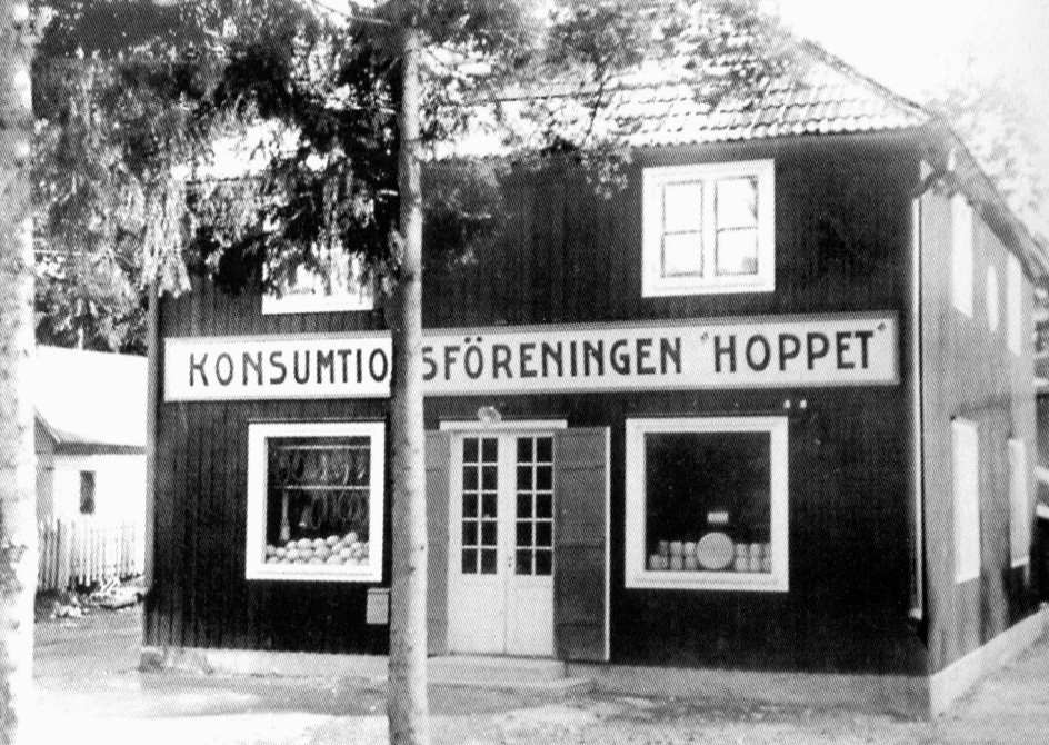 Konsumentföreningen Hoppet i Hägersten